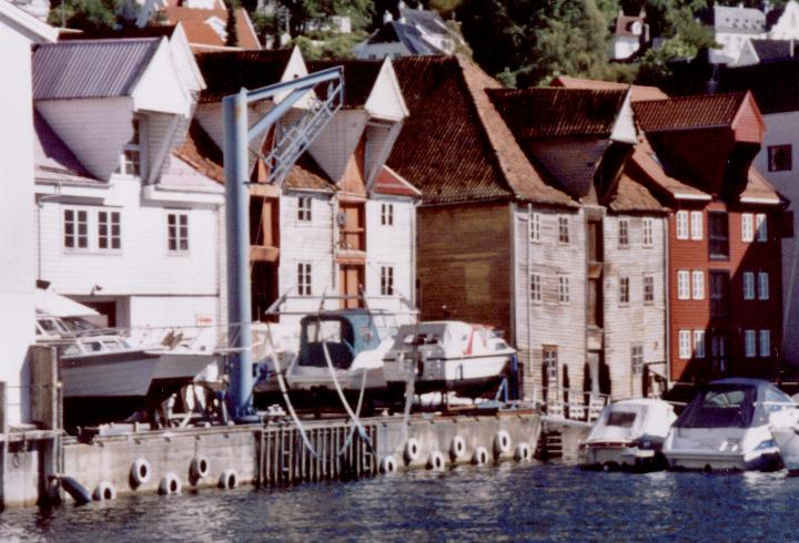 Sjøbuer i Sandviken i Bergen